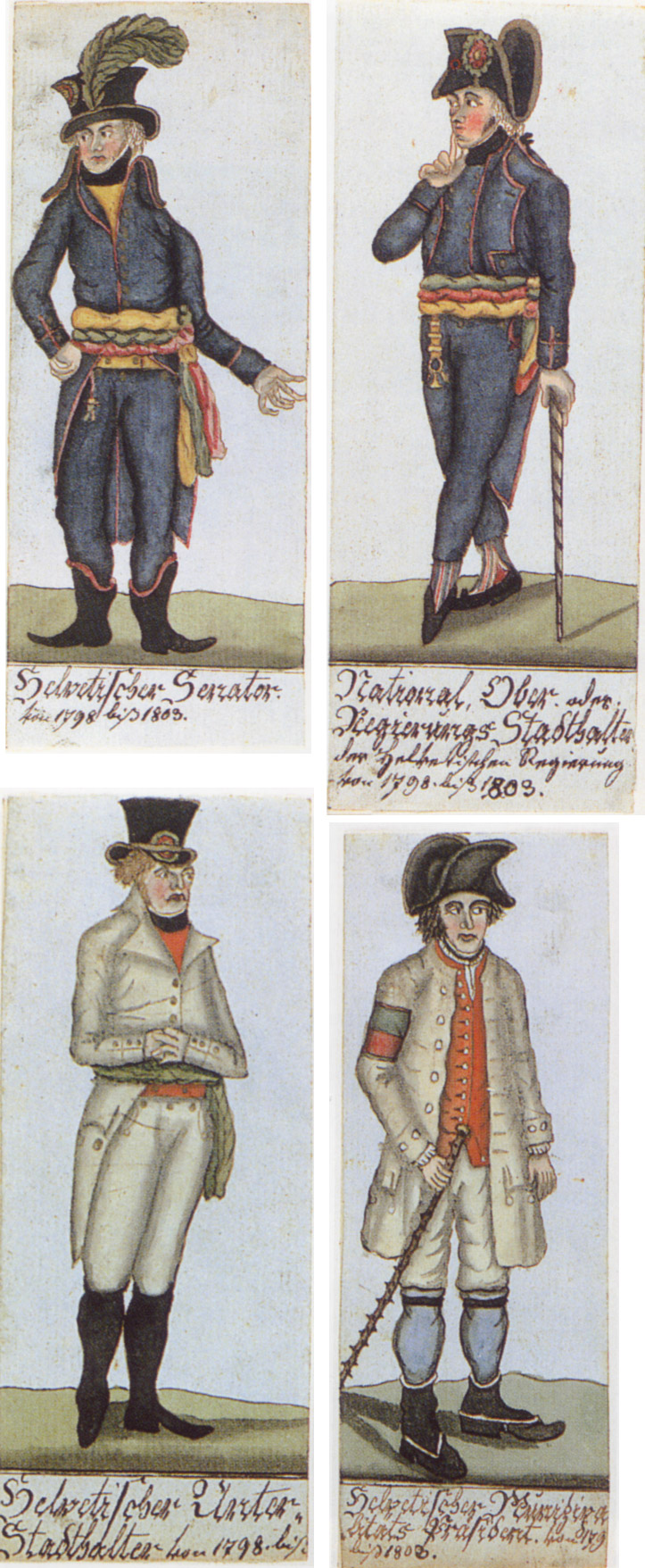 Amtsuniformen aus der Zeit der Helvetischen Republik auf zeitgenössischen Aquarellen: Oben links ein Senator, oben rechts ein Regierungsstatthalter, unten links ein Unterstatthalter, unten rechts ein Munizipalitätspräsident